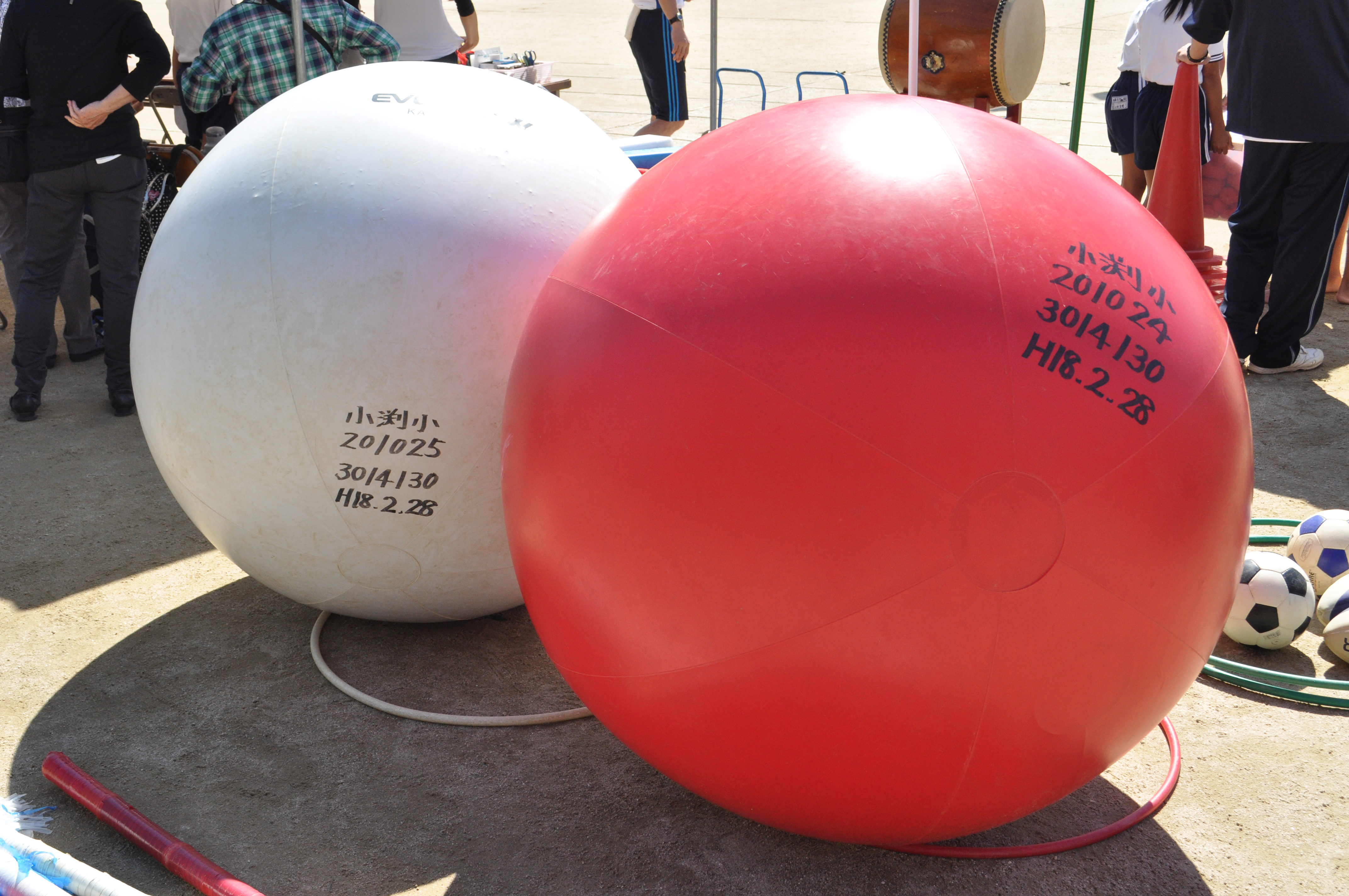 Evernew製の大玉転がし用大玉